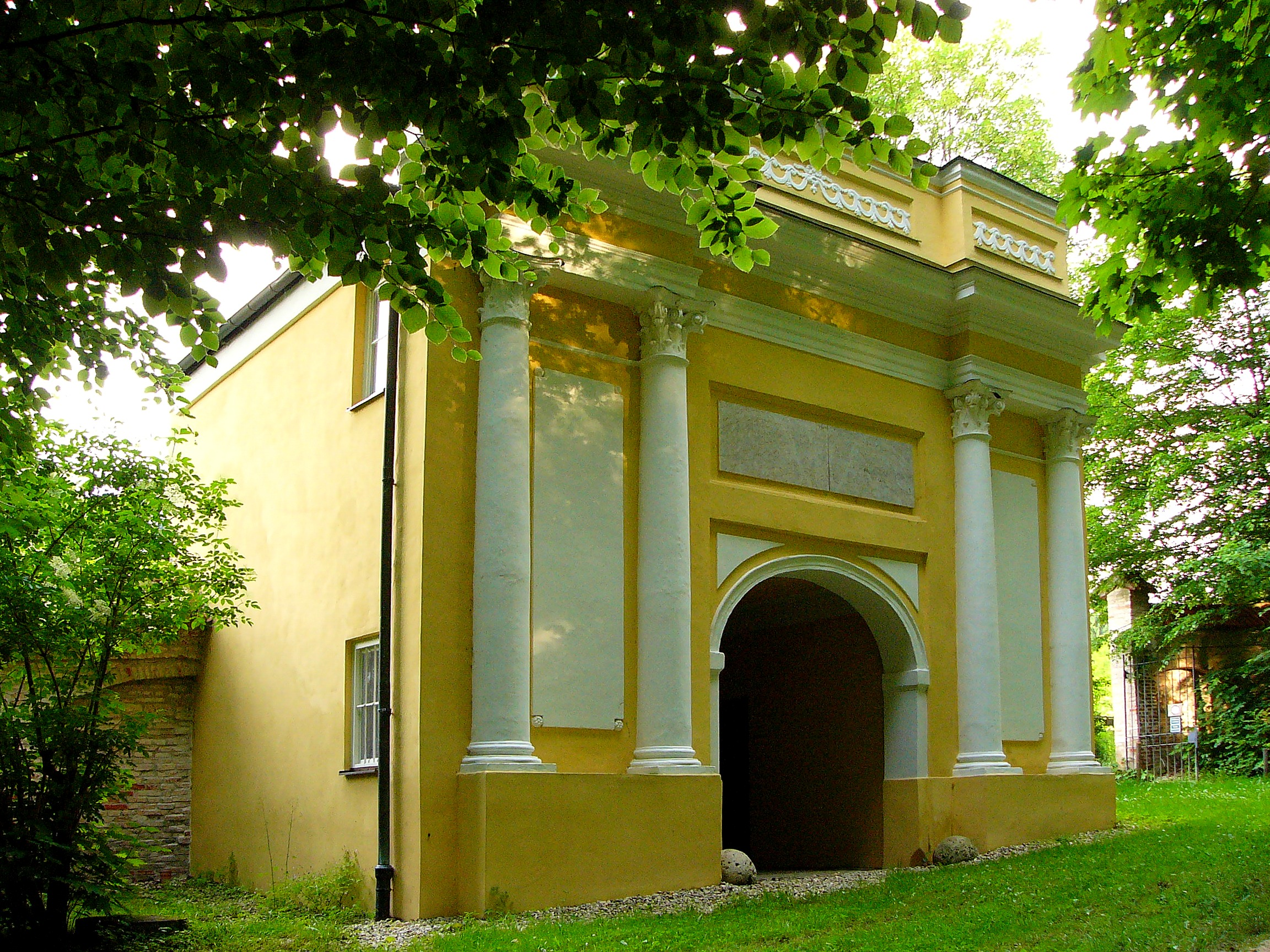 Torbau; zweigeschossiger Putzbau mit Satteldach und klassizistischem Einfahrtstor, erbaut 1784.This is a photograph of an architectural monument.